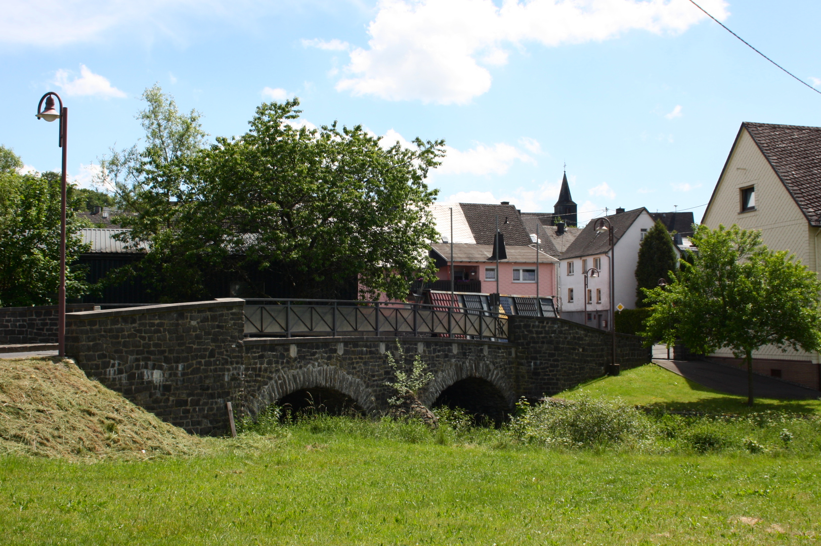 Neustadt/Westerwald, Rheinland-Pfalz, Deutschland